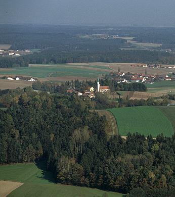 selber fotografiert